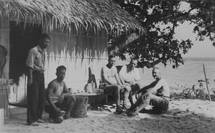 foto. Mannen bij een hut op het strand van Trouwers-eiland (Poelau Tindjil)